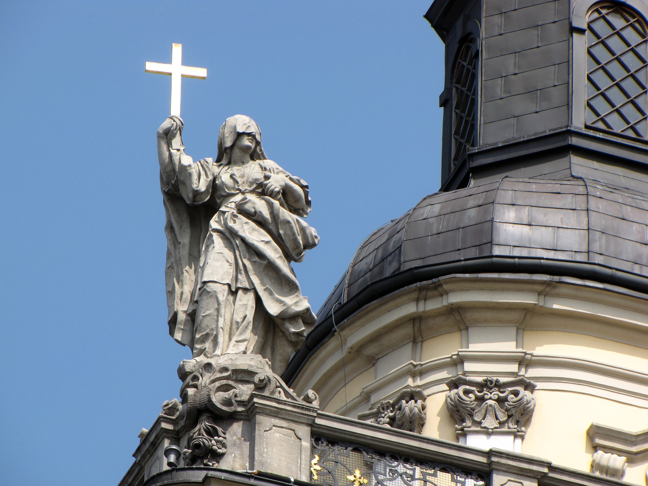 Uniwersytet we Wrocławiu